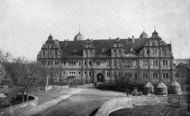 Originalbeschreibung „Schloß Bevern“. – Niedersachsen, Deutschland.